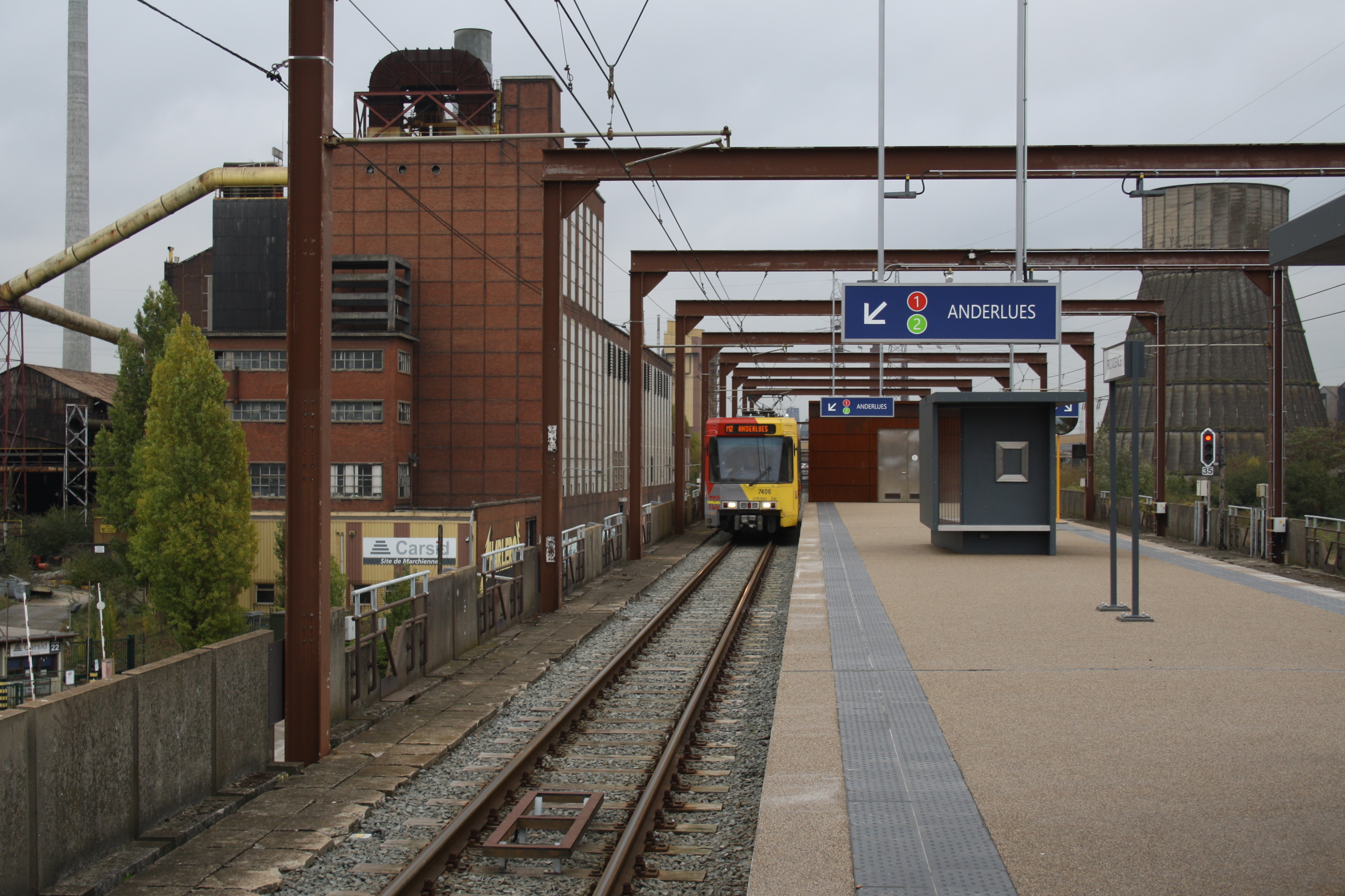 Métro Charleroi Station Providence